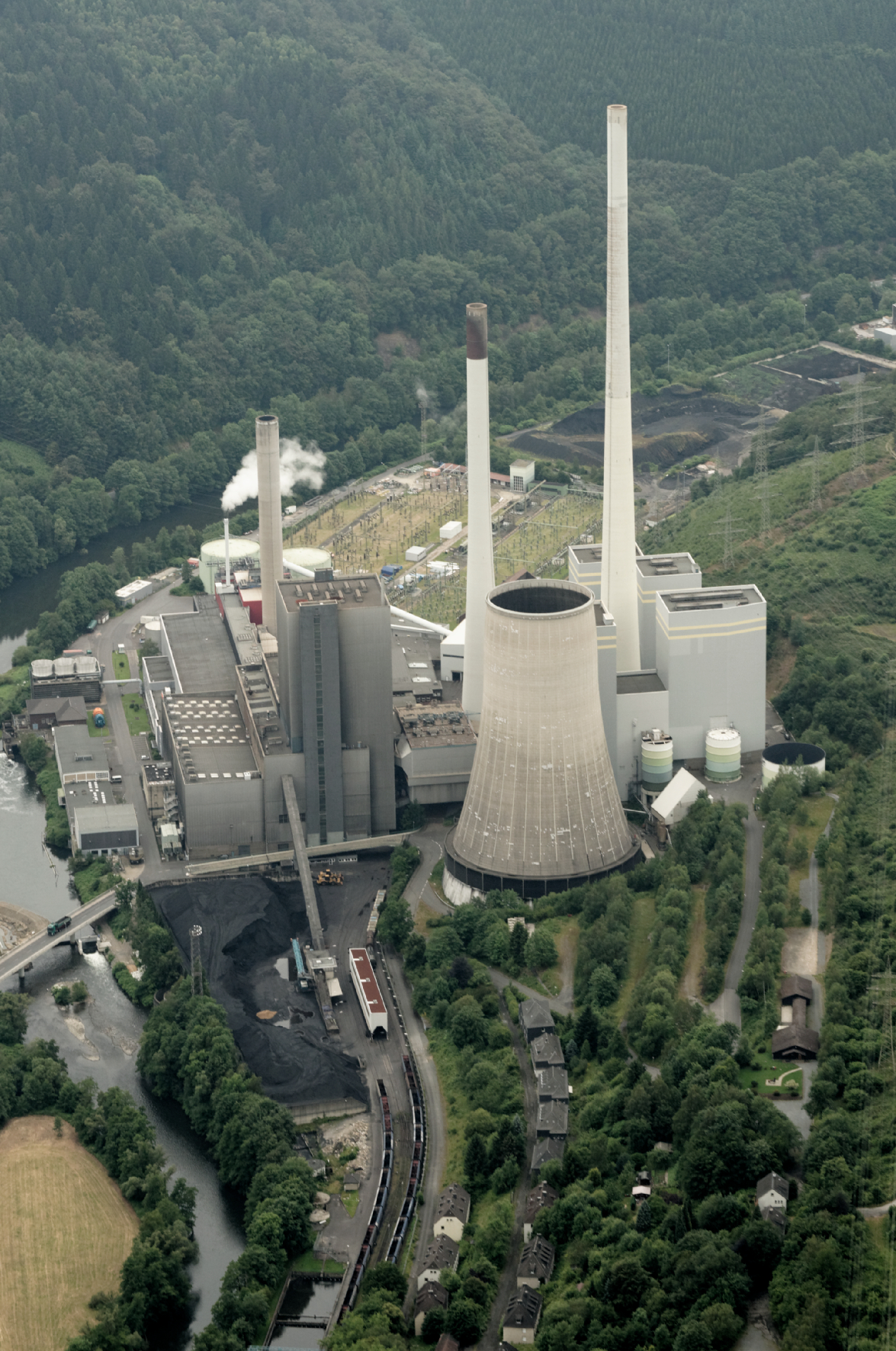 Fotoflug Sauerland Nord. Kraftwerk Werdohl-Elverlingsen im Lennetal, Blickrichtung Nord The making of this document was supported by the Community-Budget of Wikimedia Germany.